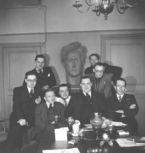 Le Groupe Rupture chez Fernand Dumont en 1938. Au fond la tête de Rimbaud sculptée par Van de Spiegele